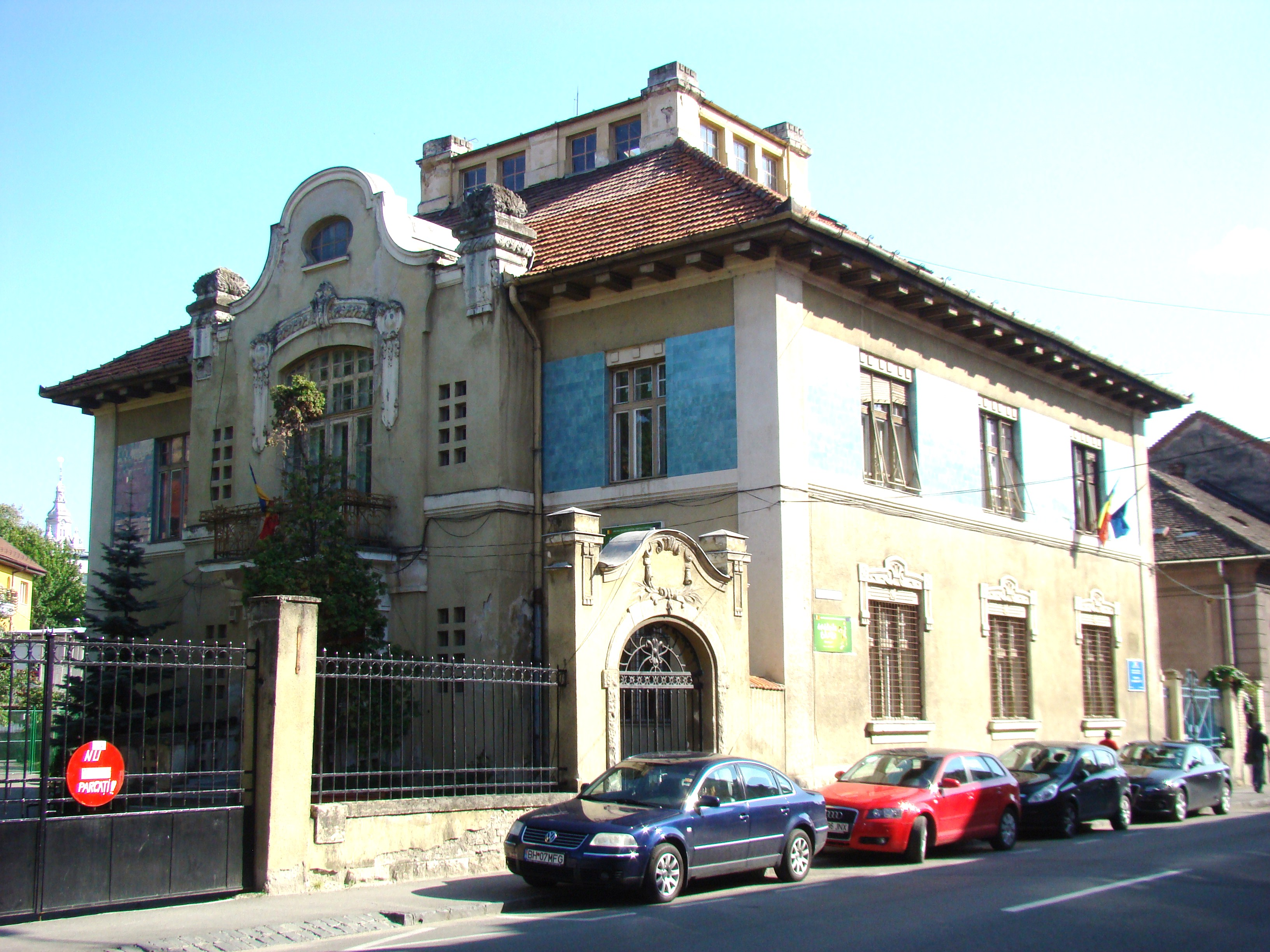 Clădire monument, str. Cardinal Iuliu Hossu, nr.1